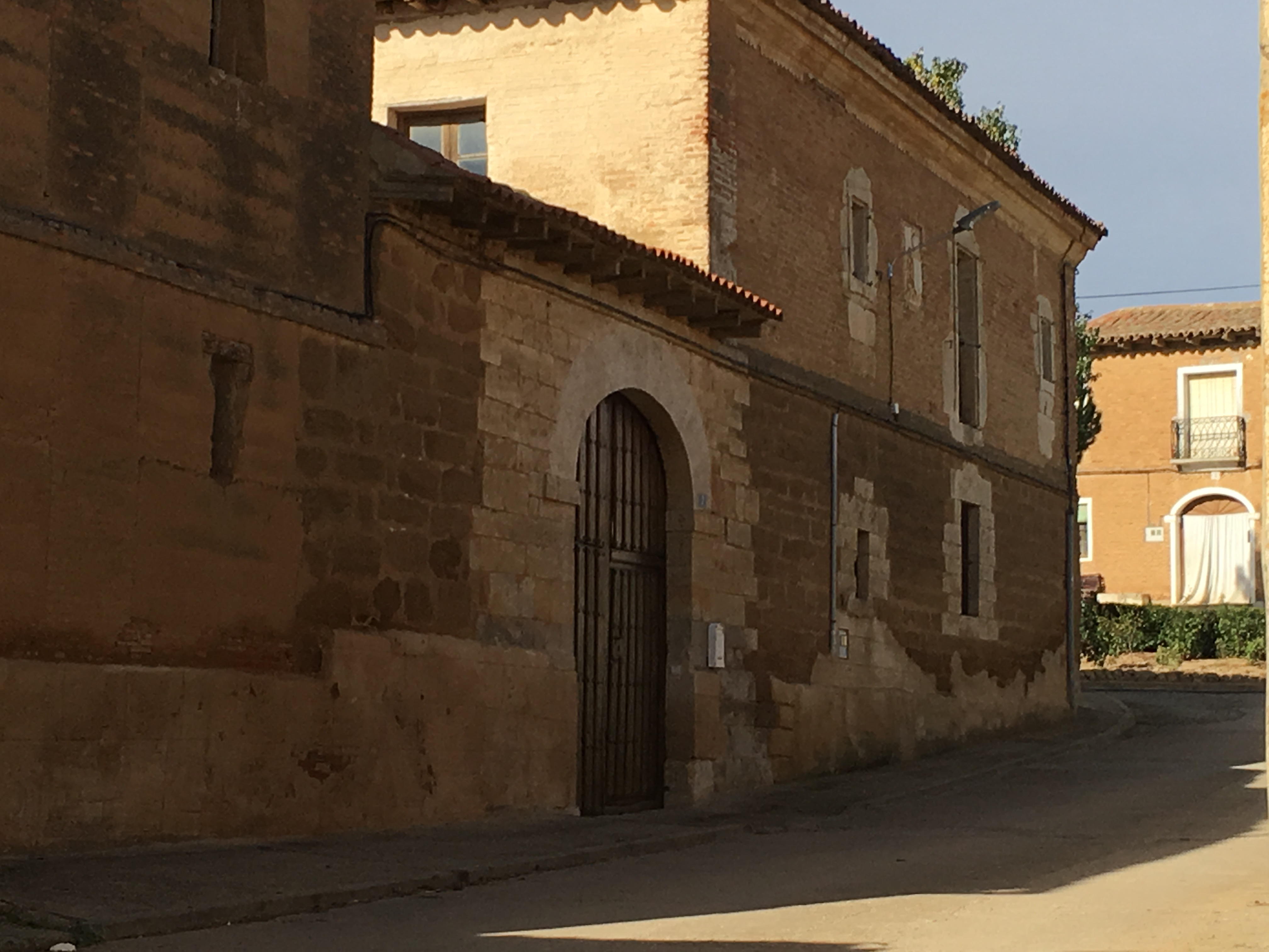 Villaesper Milenario